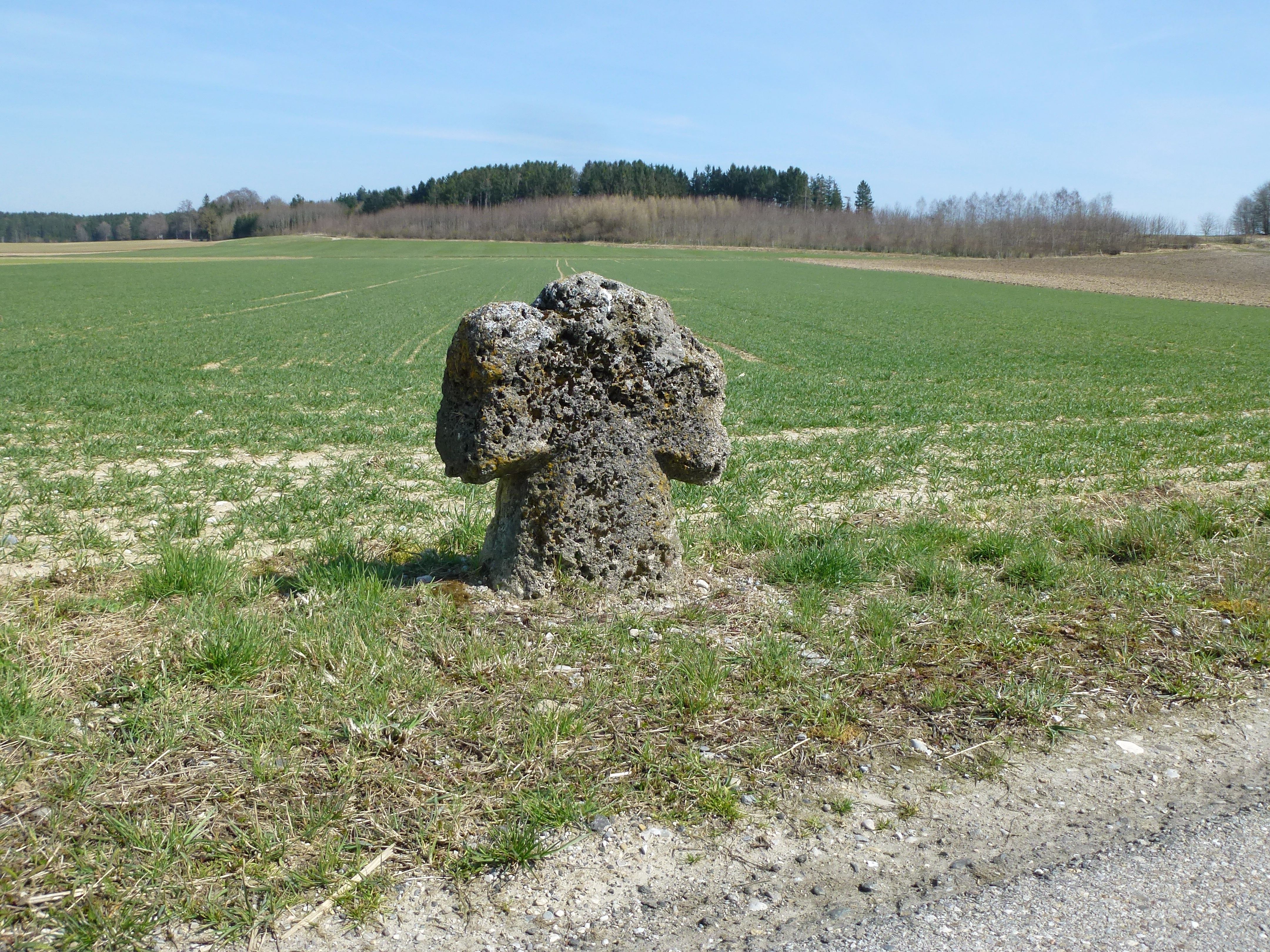 Endmoräne Vogelberg nördlich von Geltendorf. Die äußere Würm-Endmoräne ist nur noch in Resten erhalten. Die Aufnahme zeigt den flachen Nordhang von NW her; im Vordergrund ein Tuffsteinkreuz direkt an der Römerstraße von Geltendorf nach Hausen